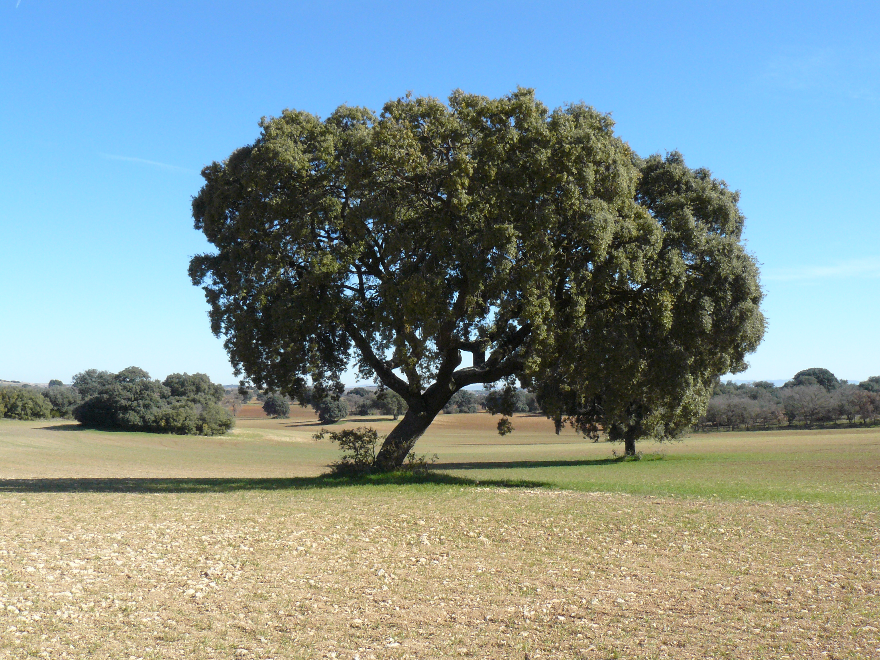 Encina de la dehesa de Brea de Tajo.